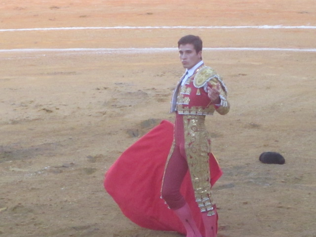 José Carlos Venegas